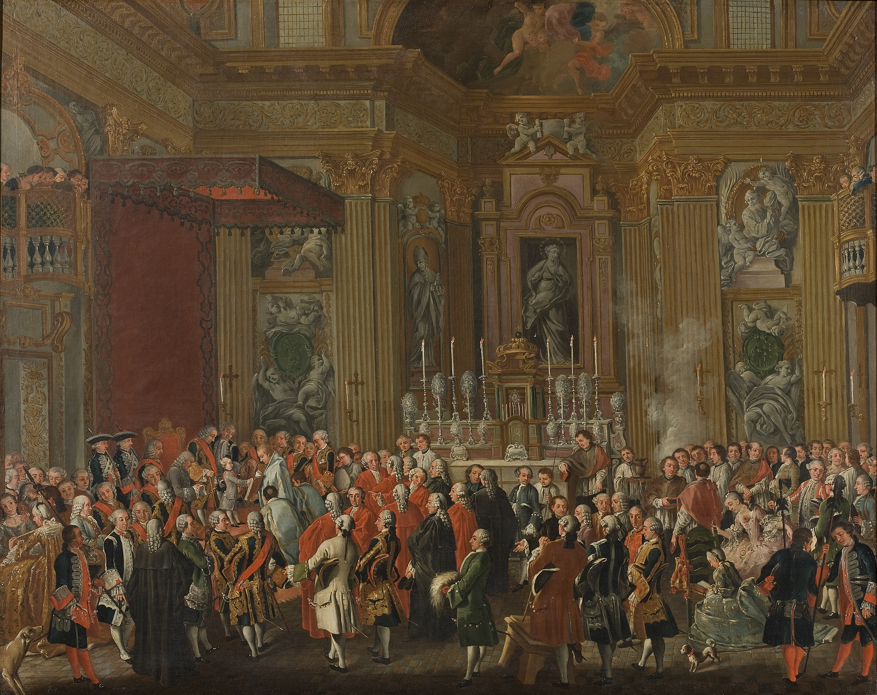 Giuramento di Ferdinando IV di Borbone come Re di Napoli e di Sicilia